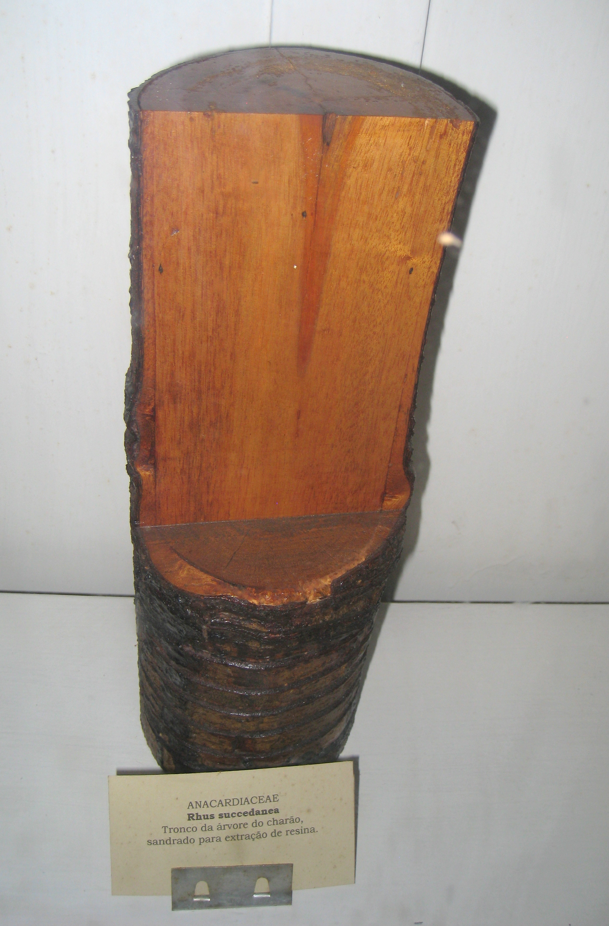 Toxicodendron succedaneum (Rhus succedanea) specimen in the Museu Botânico Dr. João Barbosa Rodrigues, Jardim Botânico de São Paulo, São Paulo City, SP, Brazil.